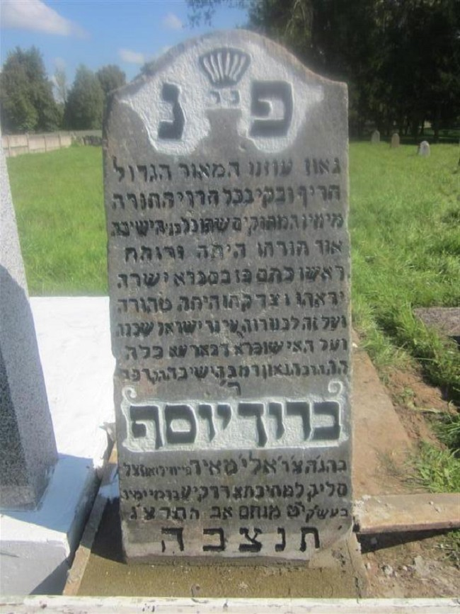 פה נטמן גאון עוזנו המאור הגדול חריף ובקי בכל חדרי התורה מימיו המתוקים שתו כל בני הישיבה אור תורתו היתה ... ראשו כתם פז בסברא ישרה יראתו וצדקתו היתה טהורה ועל זה לבנו דווה על נר ישראל שכבה ועל האי שופרא דבארעה בלה ה"ה הרב הגאון ר"מ בהישיבה הקדושה דפה ר' ברוך יוסף בהגהצ"ר אליהו מאיר פייווילזאן זצ"ל סליק למתיבתא דרקיע בדמי ימיו בעש"ק י"ט מנחם אב התרצ"ג תנצב"ה